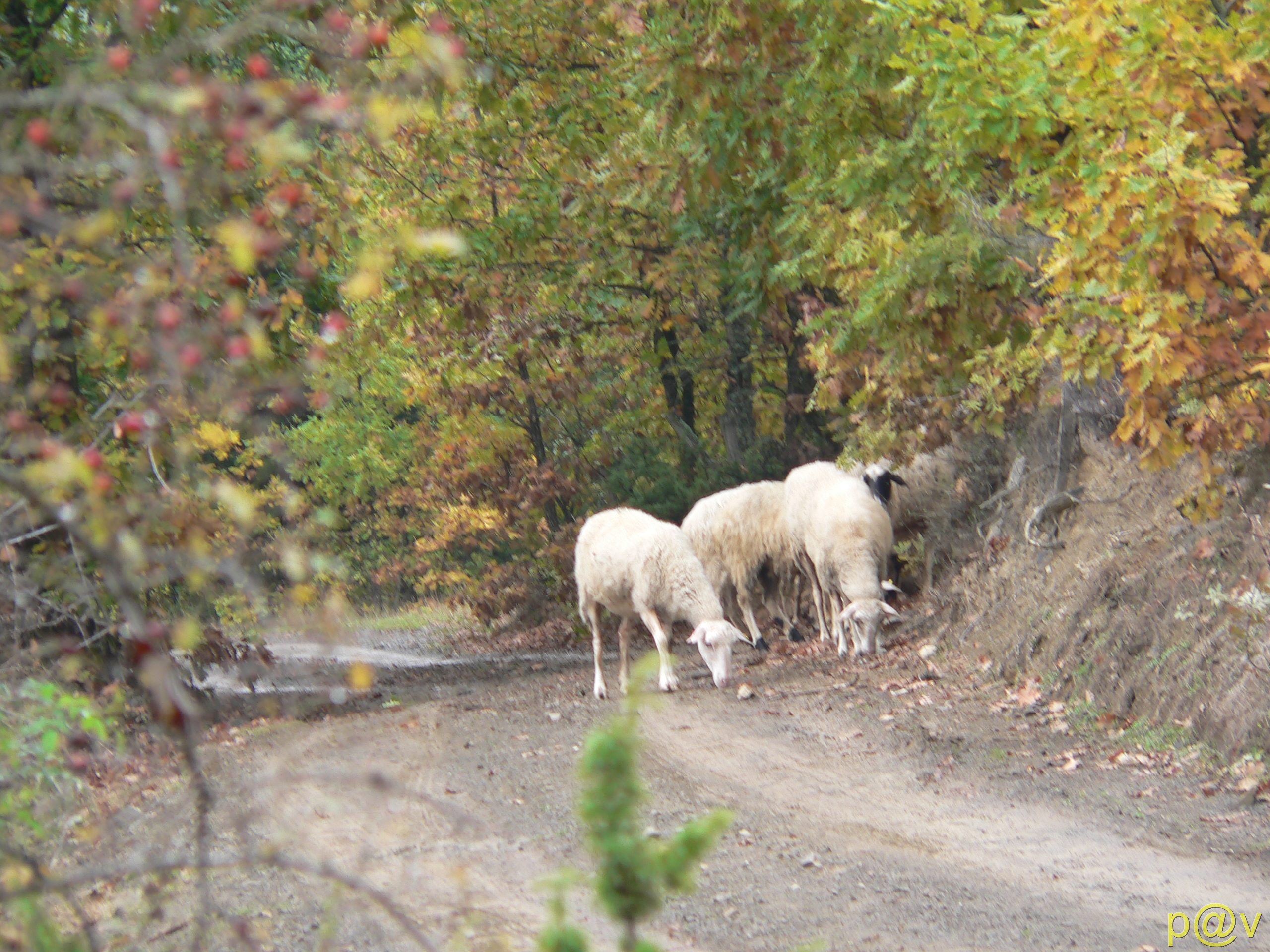 Βοσκη